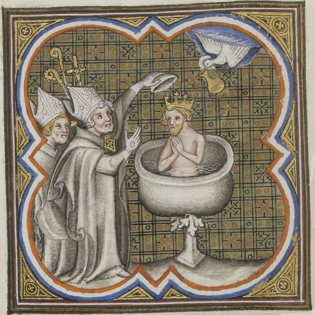 Baptême de Clovis par saint Remy, évêque de Reims. Le Saint-Esprit apporte la sainte Ampoule contenant le saint chrême servant à l'onction. Enluminure des Grandes Chroniques de France, vers 1375-1380. Paris, Bibliothèque nationale de France, département des Manuscrits, Français 2813, folio 12 verso.